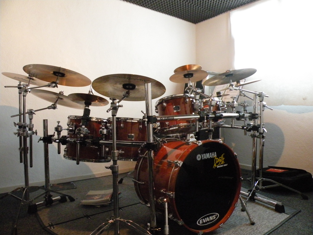 Yamaha Oak Drumset